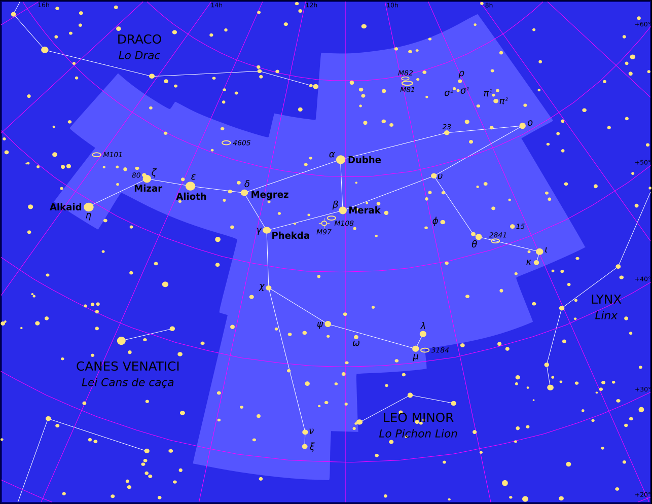 Constellacion de la Granda Orsa.